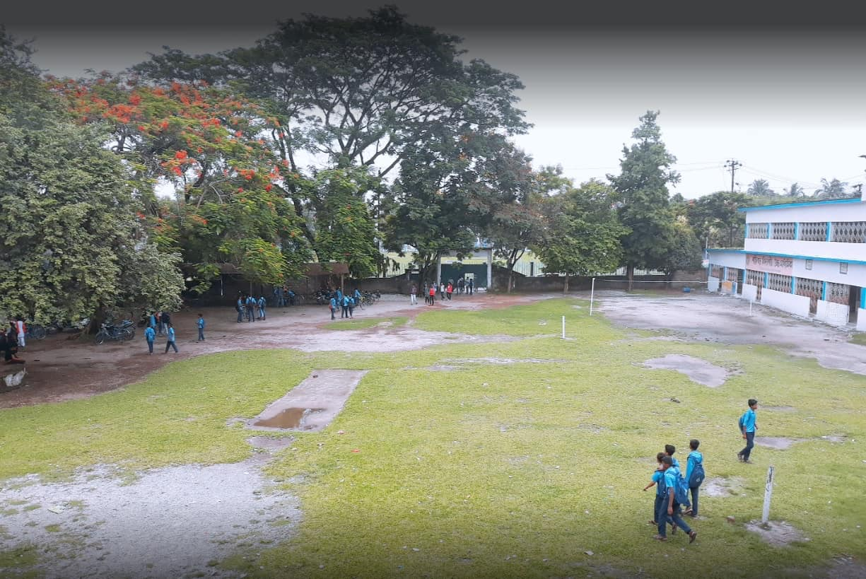 শক্তিগড় বিদ্যাপীঠ স্কুল ভিউ